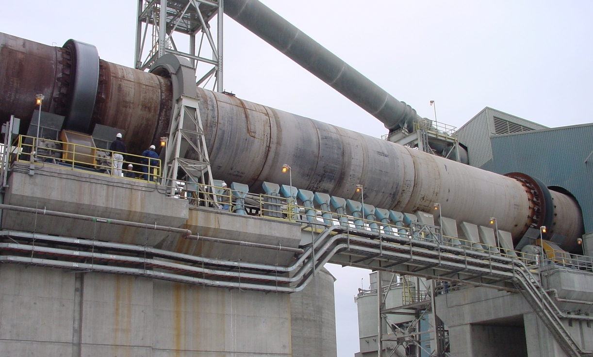 Cement kiln